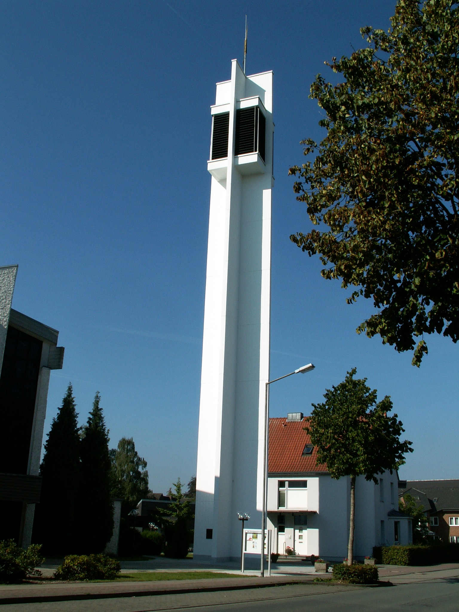 Turm der kath. Kirche St. Laurentius in Löhne, Stadtteil Obernbeck, Ansicht von Nordosten